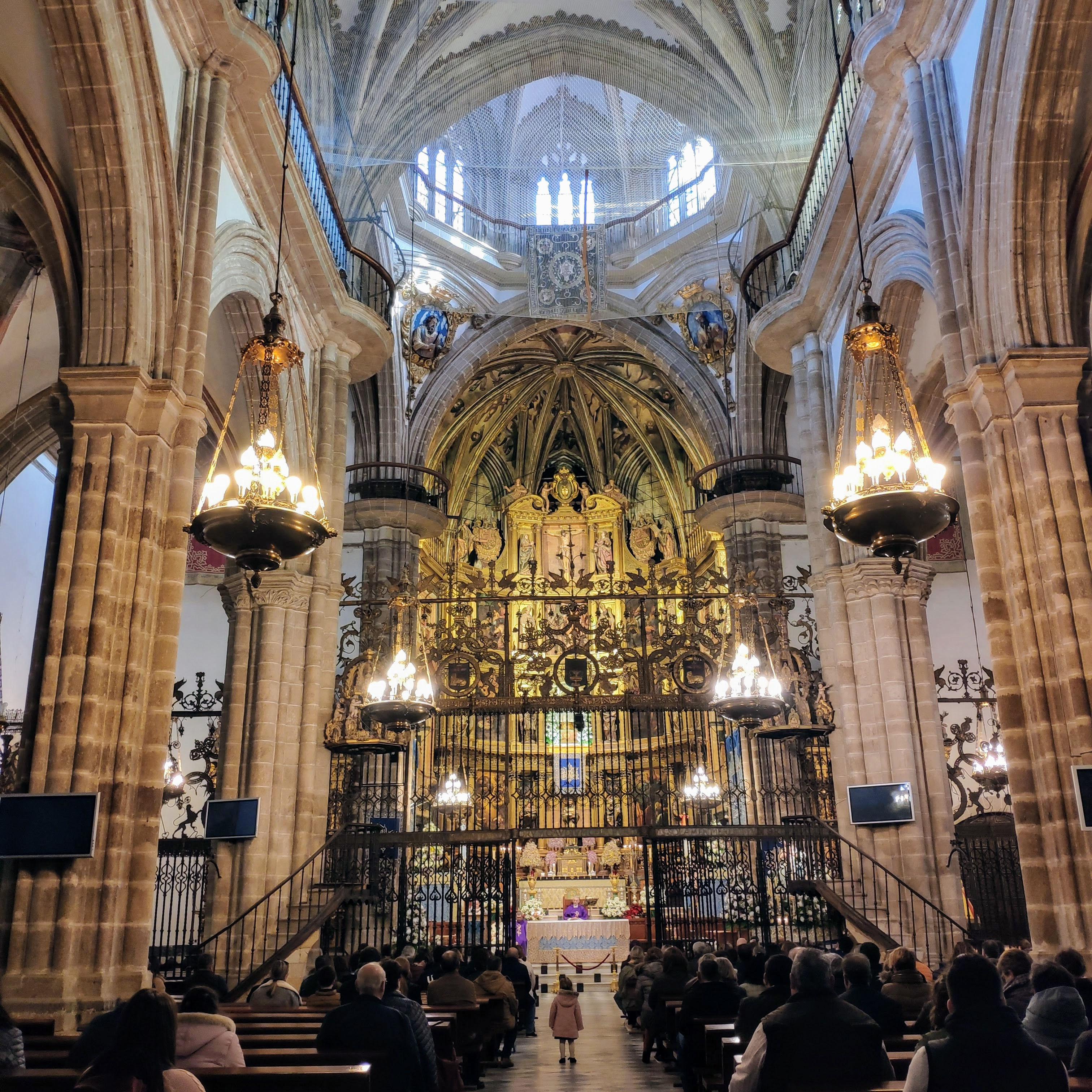 Interior de la basílica del monasterio de Guadalupe, Cáceres